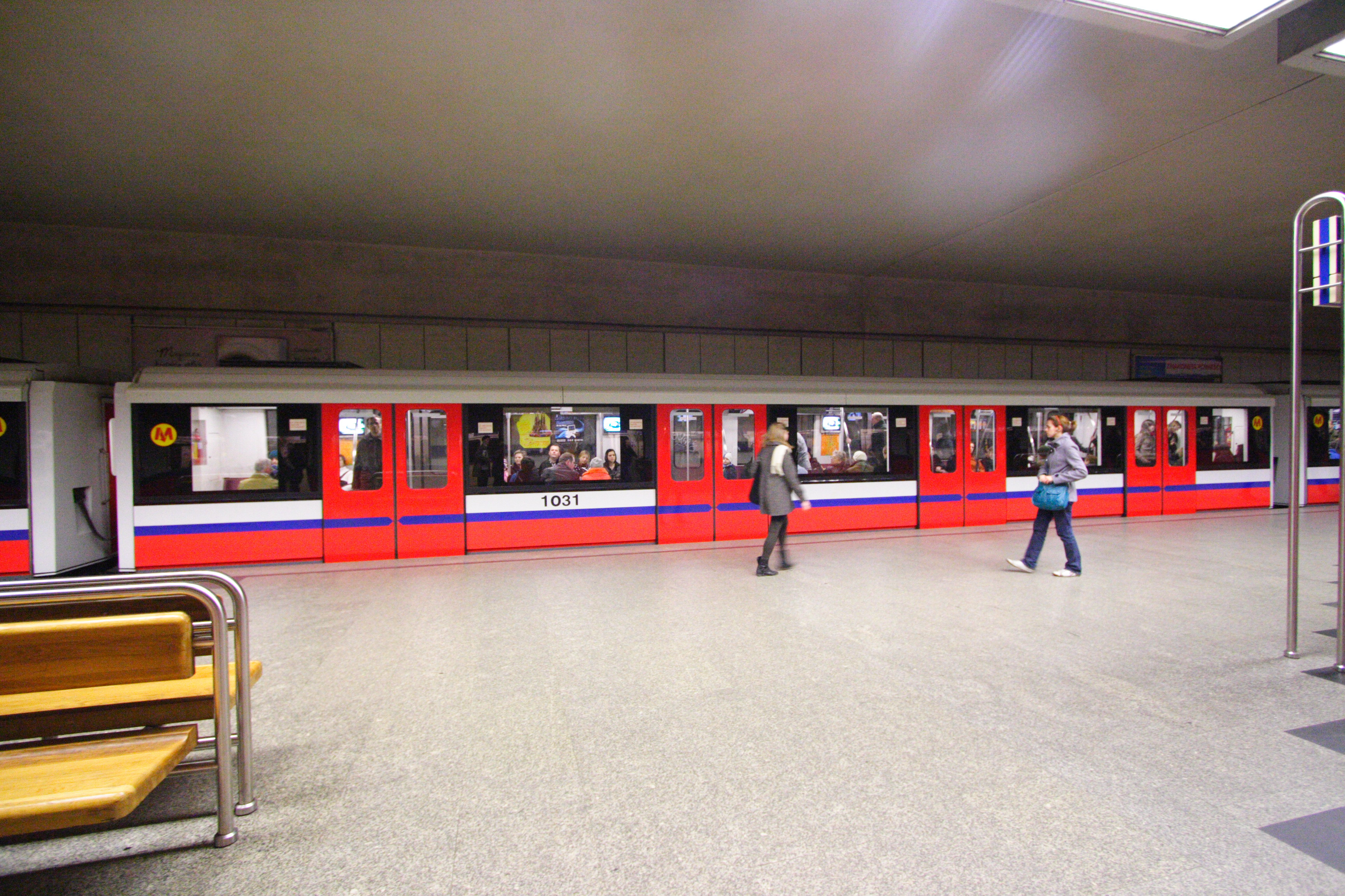 Вид вагонов нерусского производства на варшавской станции метрополитена Политехника